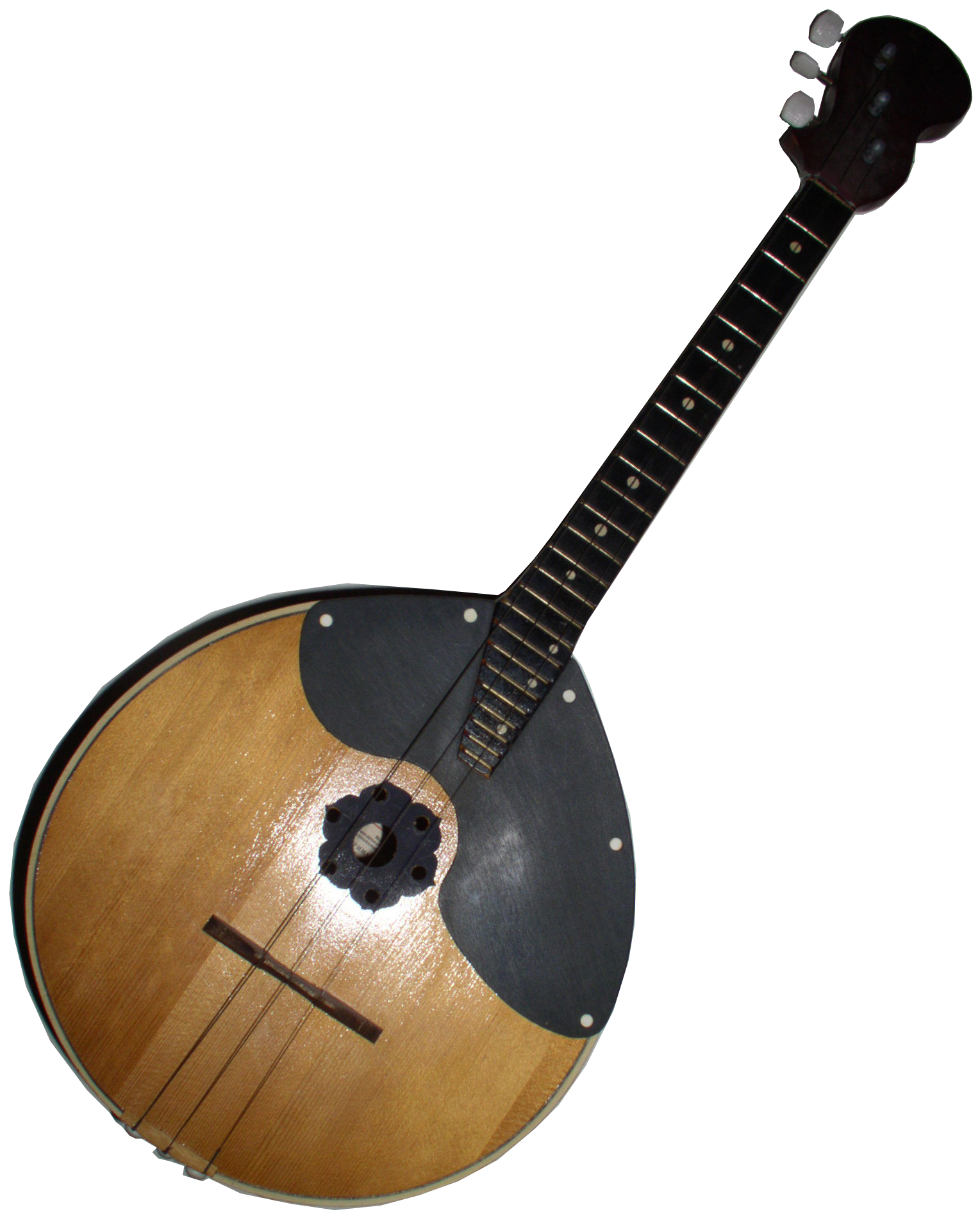 Домра трёхструнная.